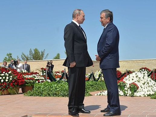 После возложения цветов к месту захоронения Ислама Каримова. Президент России Владимир Путин с Премьер-министром Узбекистана Шавкатом Мирзиёевым